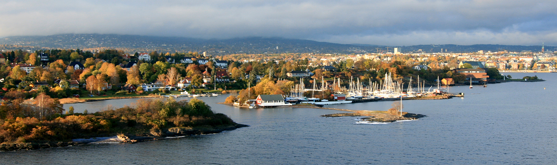 Parti fra Bygdøy, Oslo. I forgrunnen holmene Store Herbern (t.v.) og Lille Herbern.